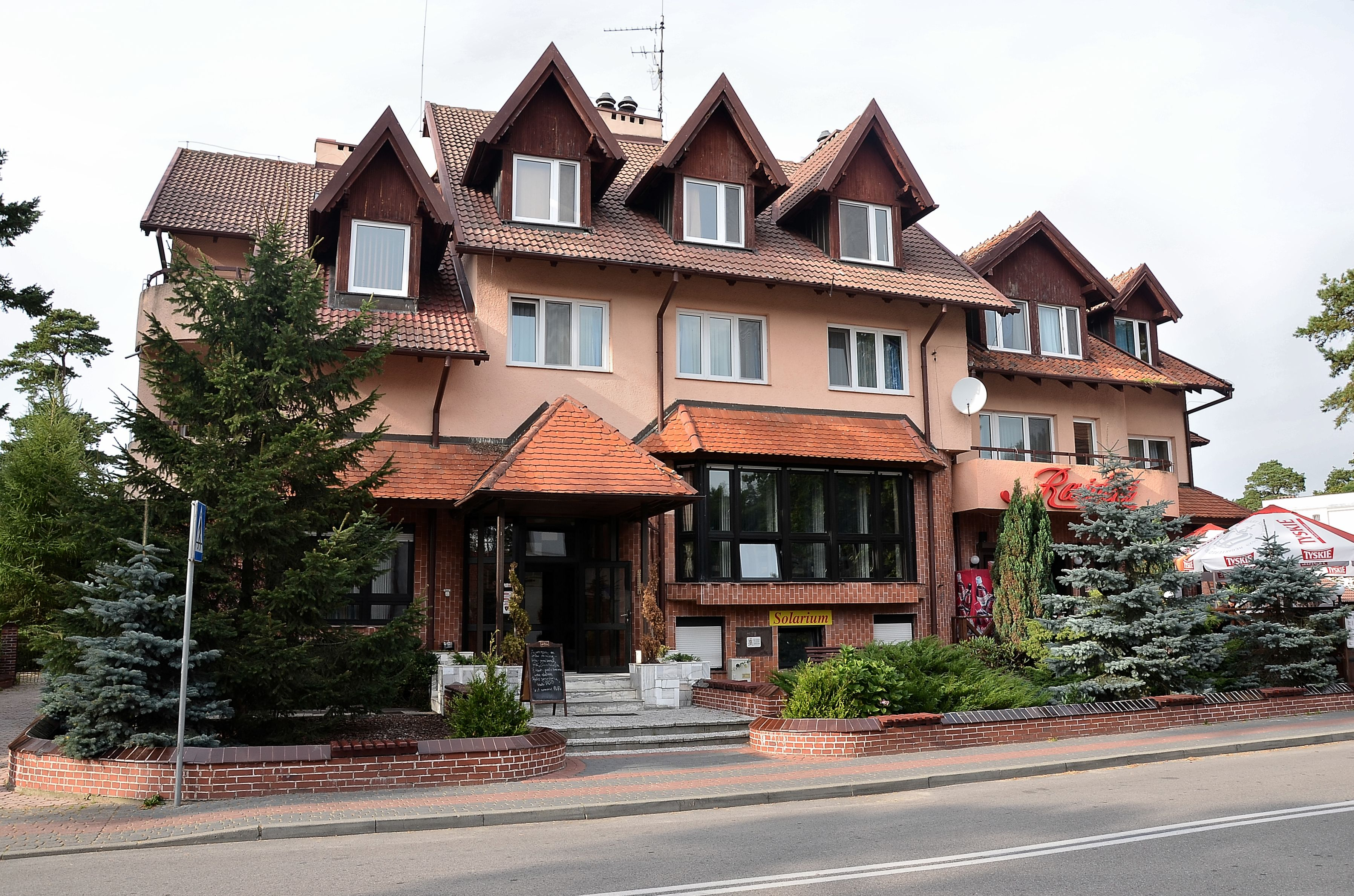 dom, pocz. XX Krynica Morska ul. Przyjaźni 11, Krynica Morska 06.1994.